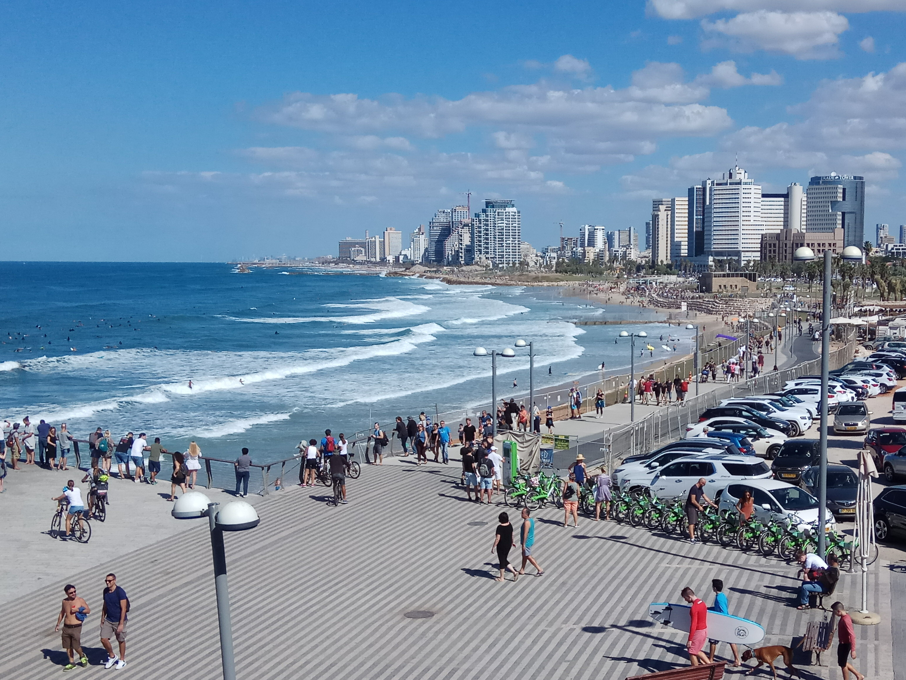 חוף תל אביב ממלון סטאי ביפו